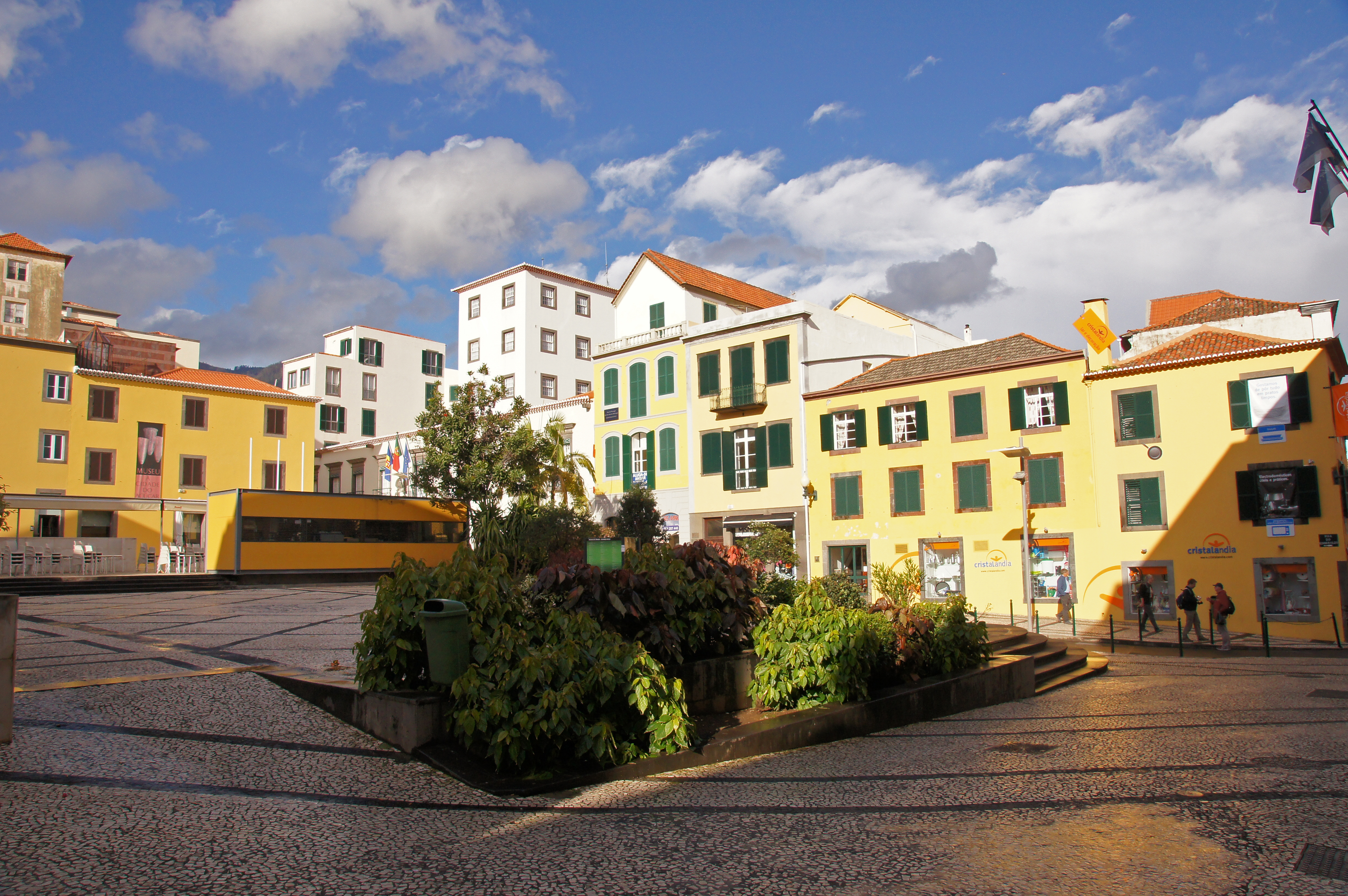 Praça Colombo, Funchal